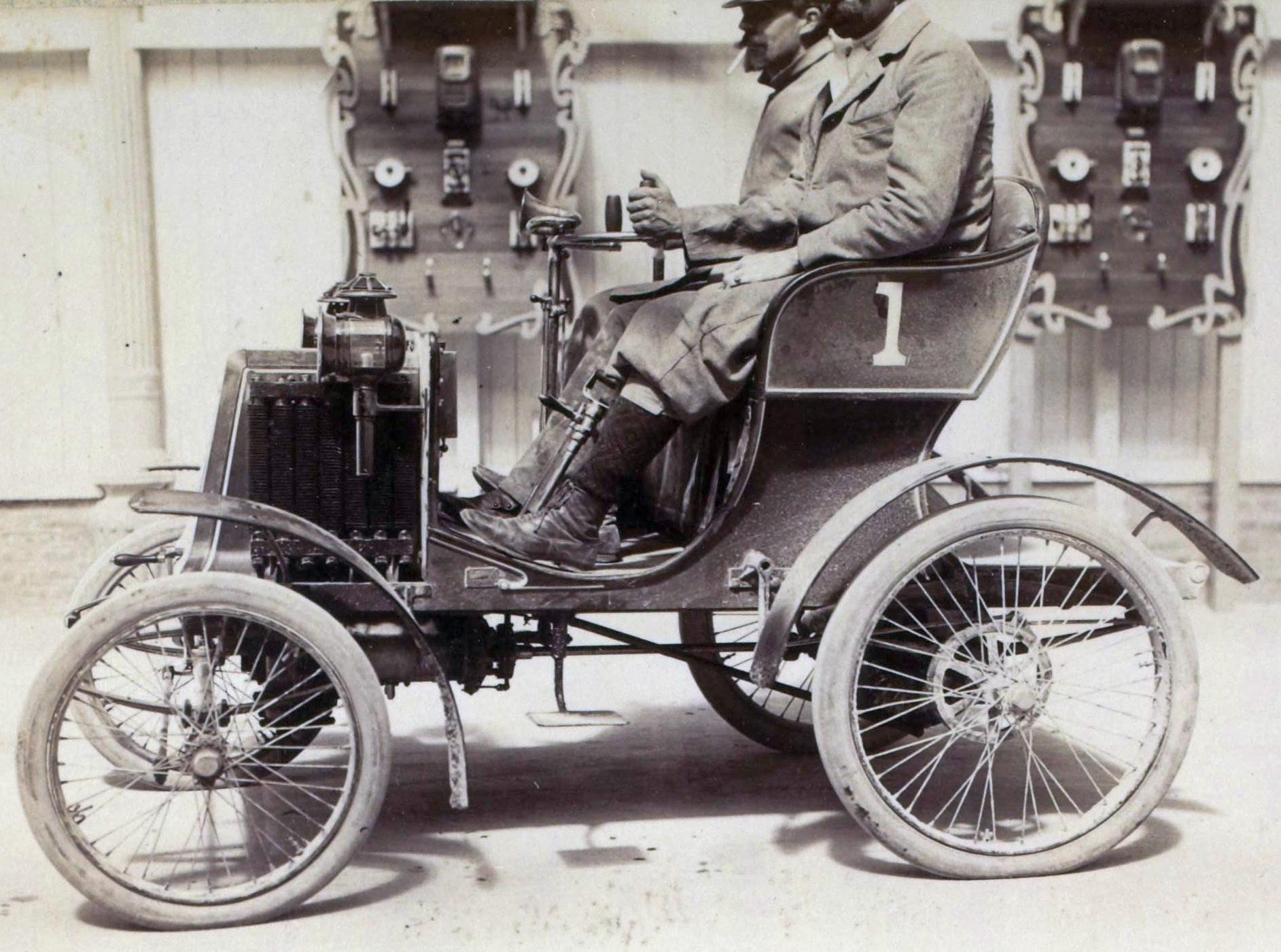 [Collection Jules Beau. Photographie sportive] : T. 12. Années 1899 et 1900 / Jules Beau : F. 4. [Concours des voiturettes] ; voiturette Renault